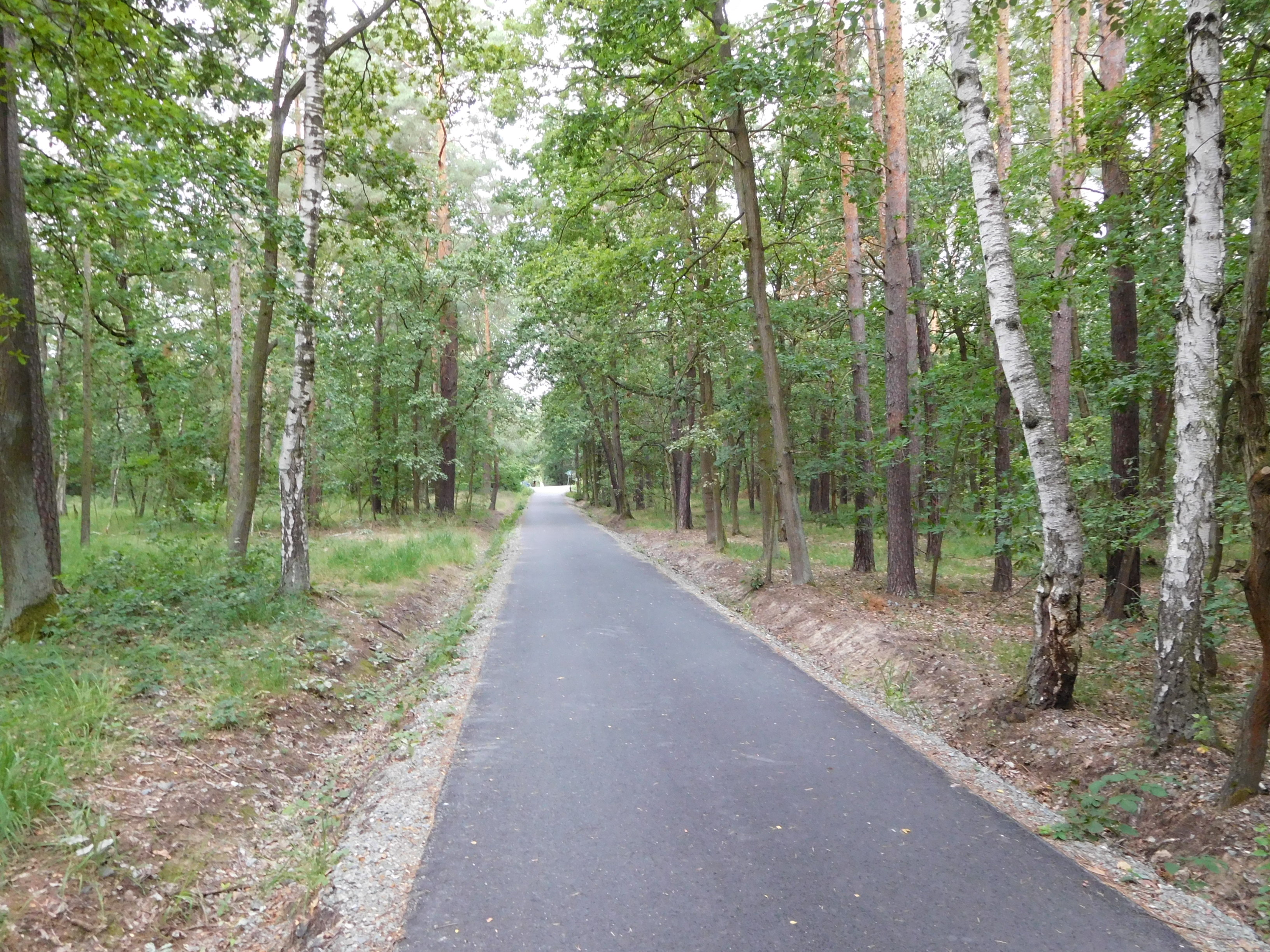 Praha - Újezd nad Lesy, Klánovický les, cyklotrasa 8211 a tur. stezka 0010